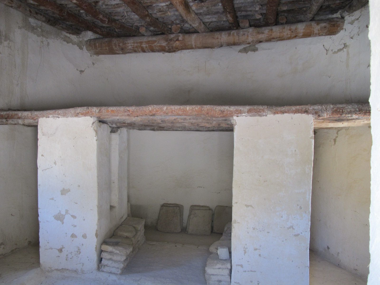 Choirokoitia, Inneres der rekonstruierten Hütten